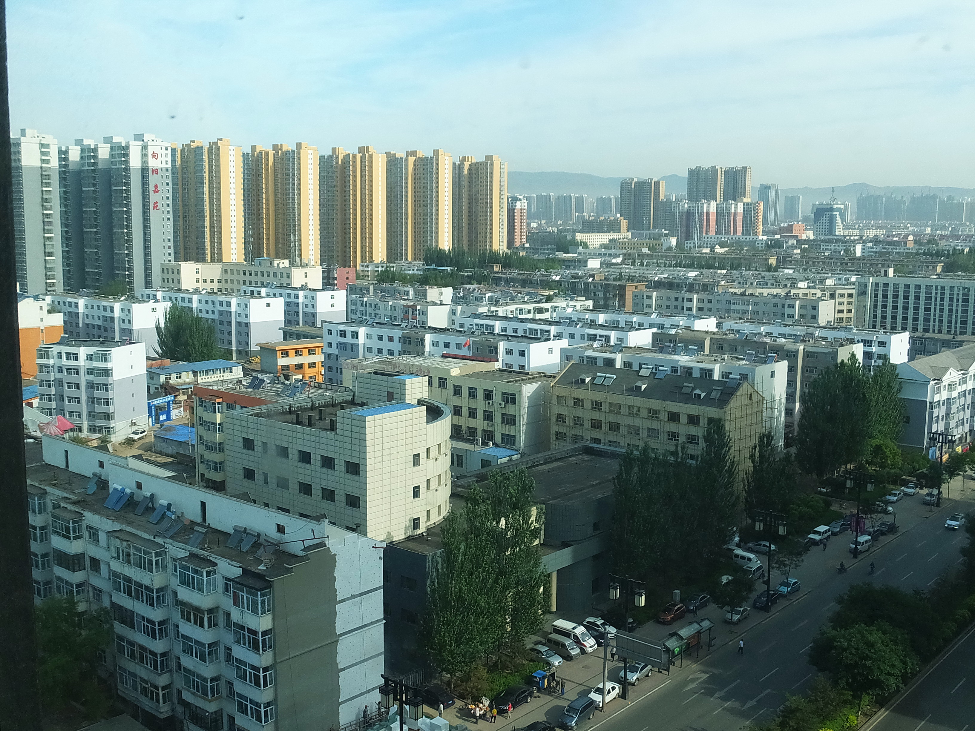 大同 Datong